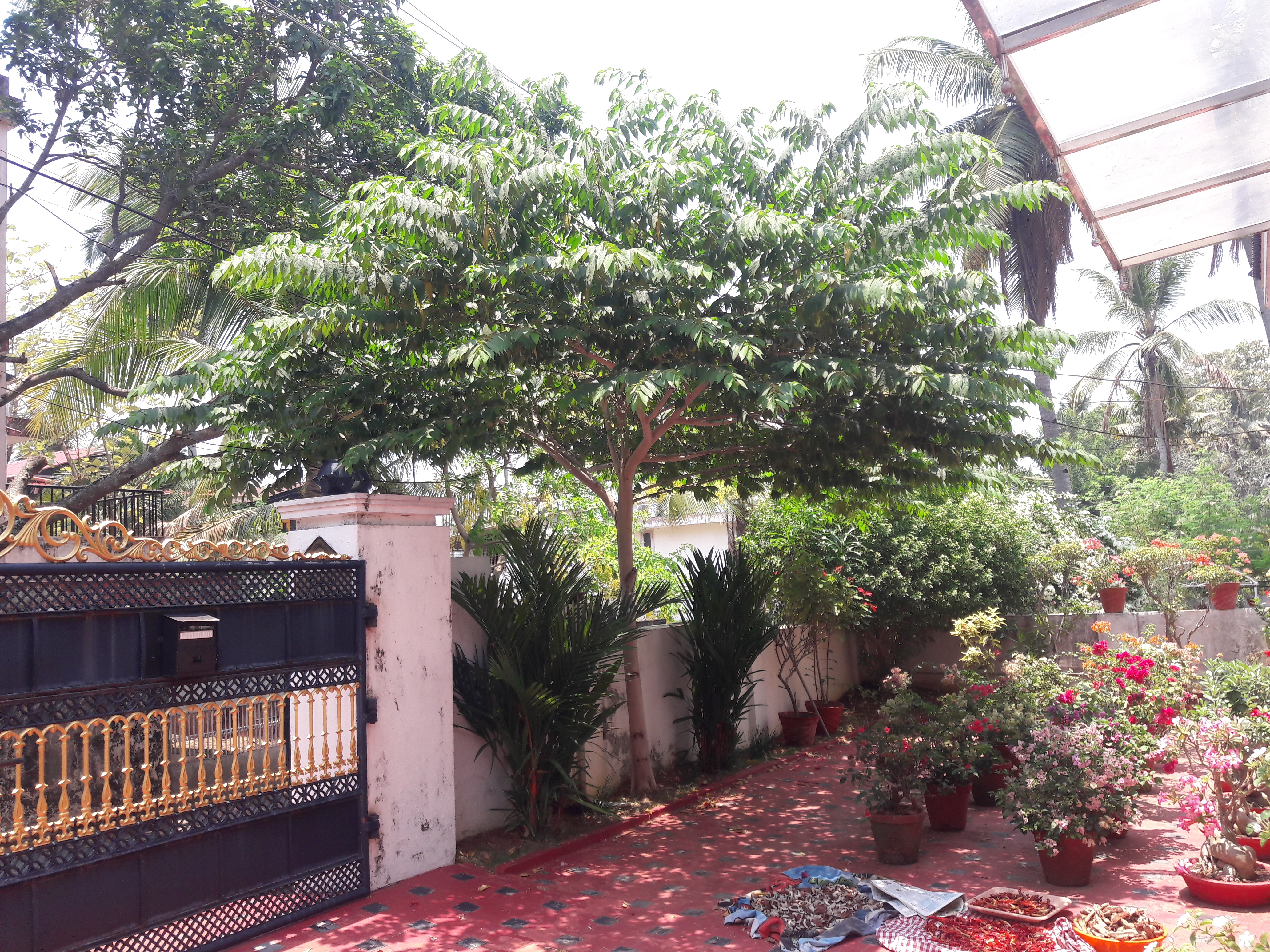 ജമൈക്കൻ ചെറിSingapore Cherry ശാസ്ത്രീയ നാമം Muntingia calabura കുടുംബം Muntingiaceae.